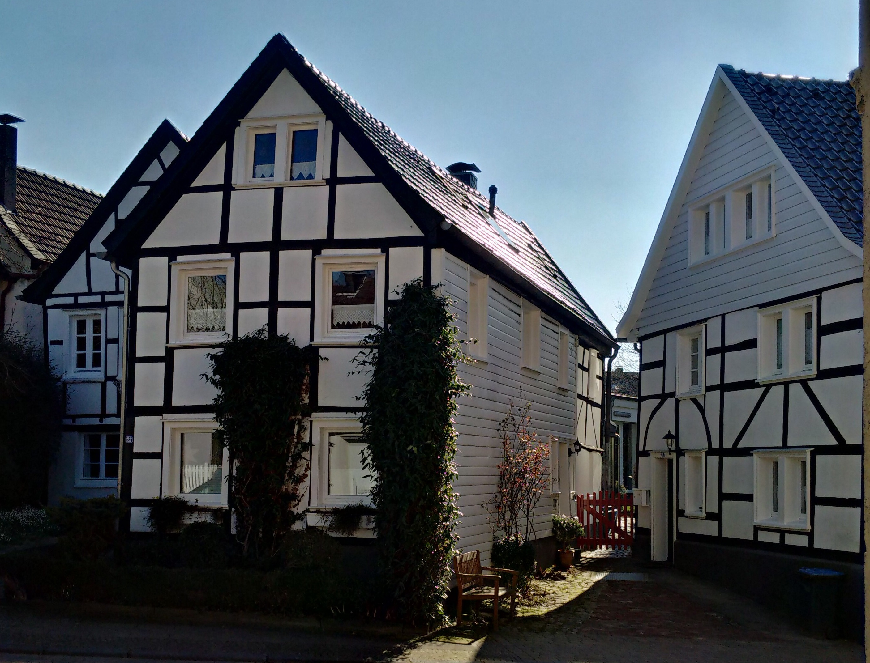 Fachwerkhäuser im Ortskern von Solingen-Wald an der Opferfelder Straße, aufgenommen im Februar 2016